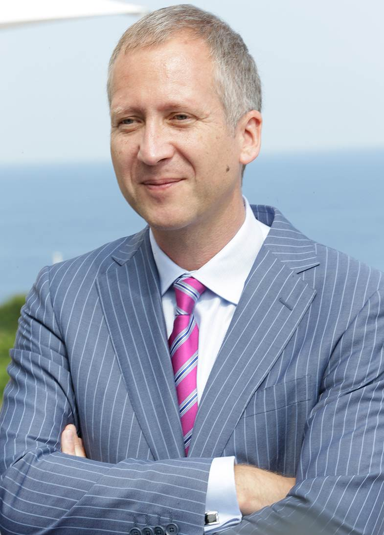 Photo de Vadim Vasilyev